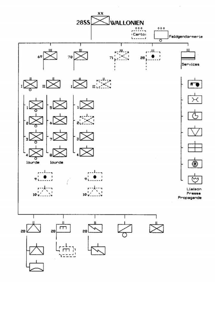 Organigramme de la 28.Division Wallonien